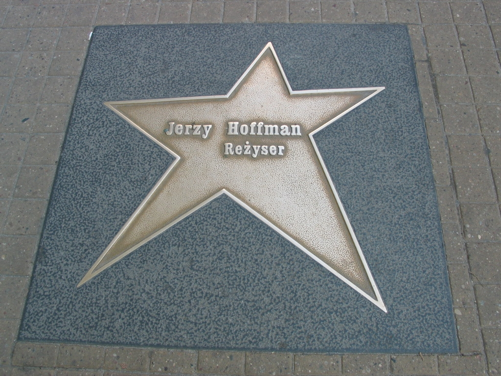 Łódź Walk of Fame - Jerzy Hoffman